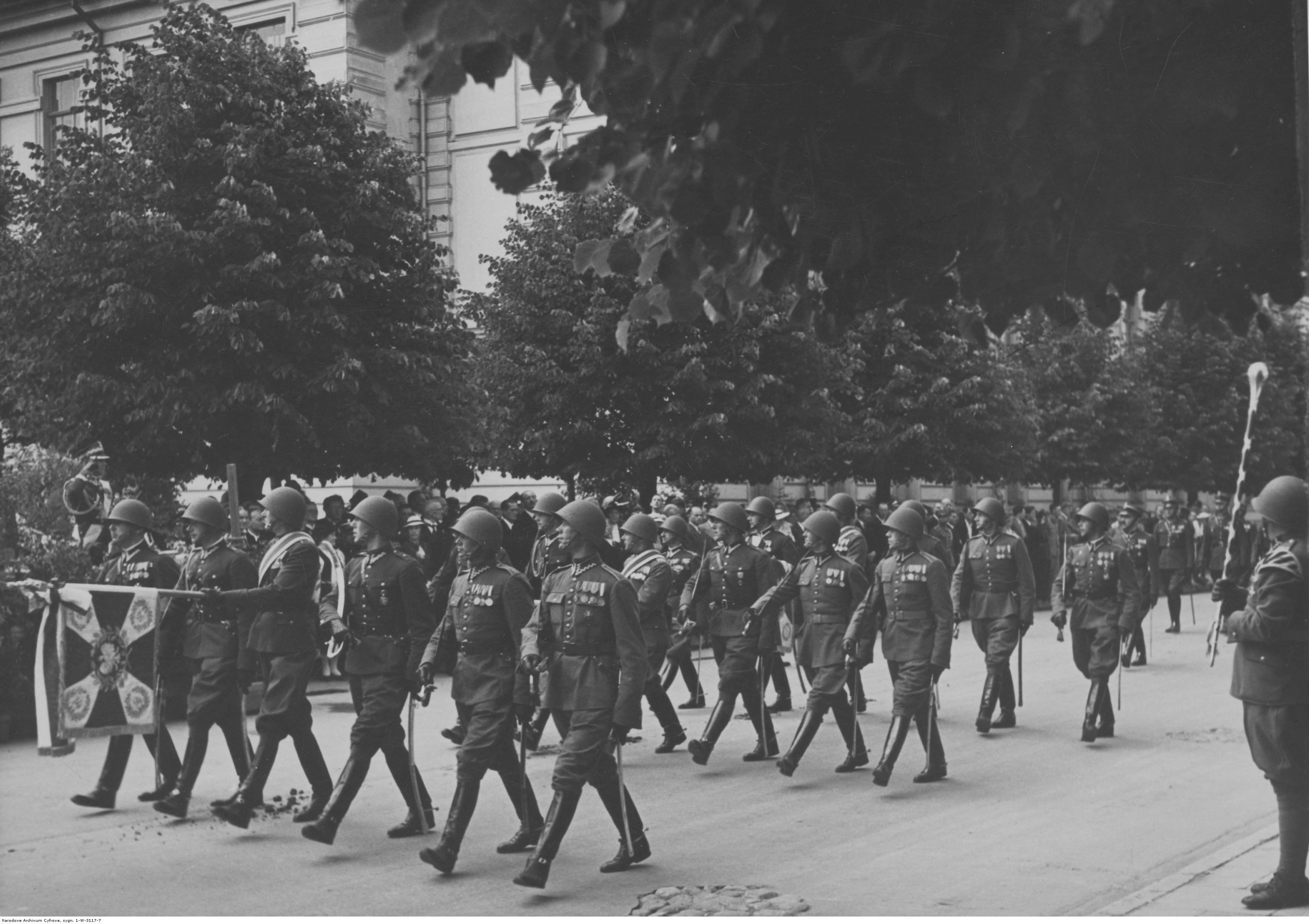 Wręczenie sztandarów ufundowanych przez ludność ziemi wileńskiej pułkom artylerii w Wilnie. Defilada spieszonego pocztu sztandarowego z 14 Dywizjonu Artylerii Konnej, przed marszałkiem Edwardem Rydzem-Śmigłym, podczas uroczystości wręczenia sztandaru. Poczet sztandarowy salutuje sztandarem. Koncern Ilustrowany Kurier Codzienny - Archiwum Ilustracji. Sygnatura: 1-W-3117-7